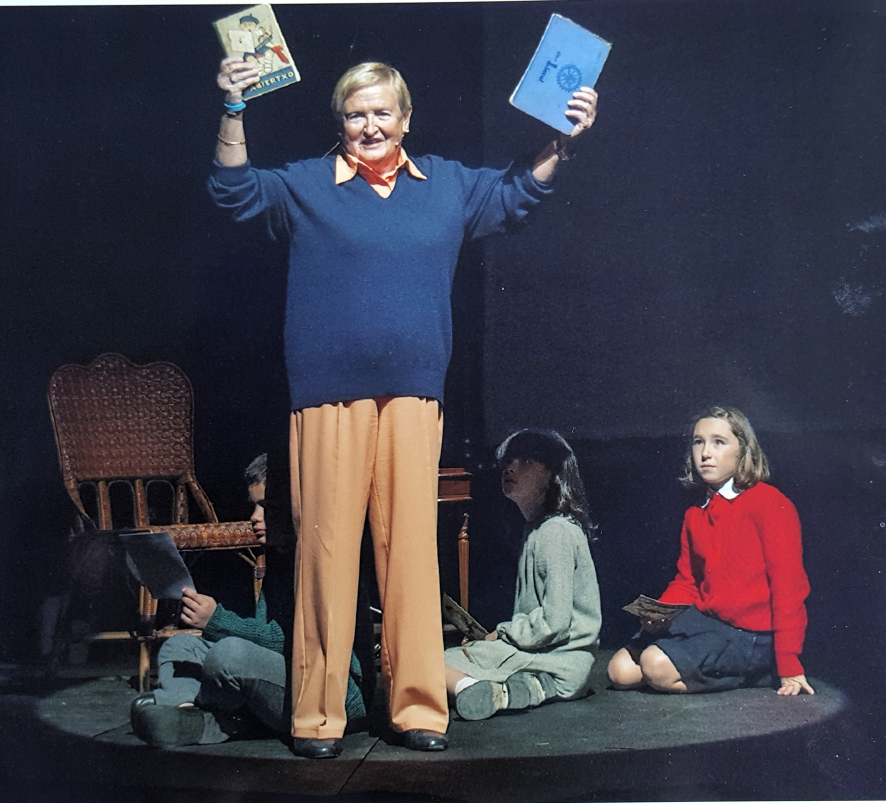 Kontxita Beitia maistra antzerki lan batean Elbira Zipitriaren papera egiten Xabietxo liburuarekin eta Blokarekin.